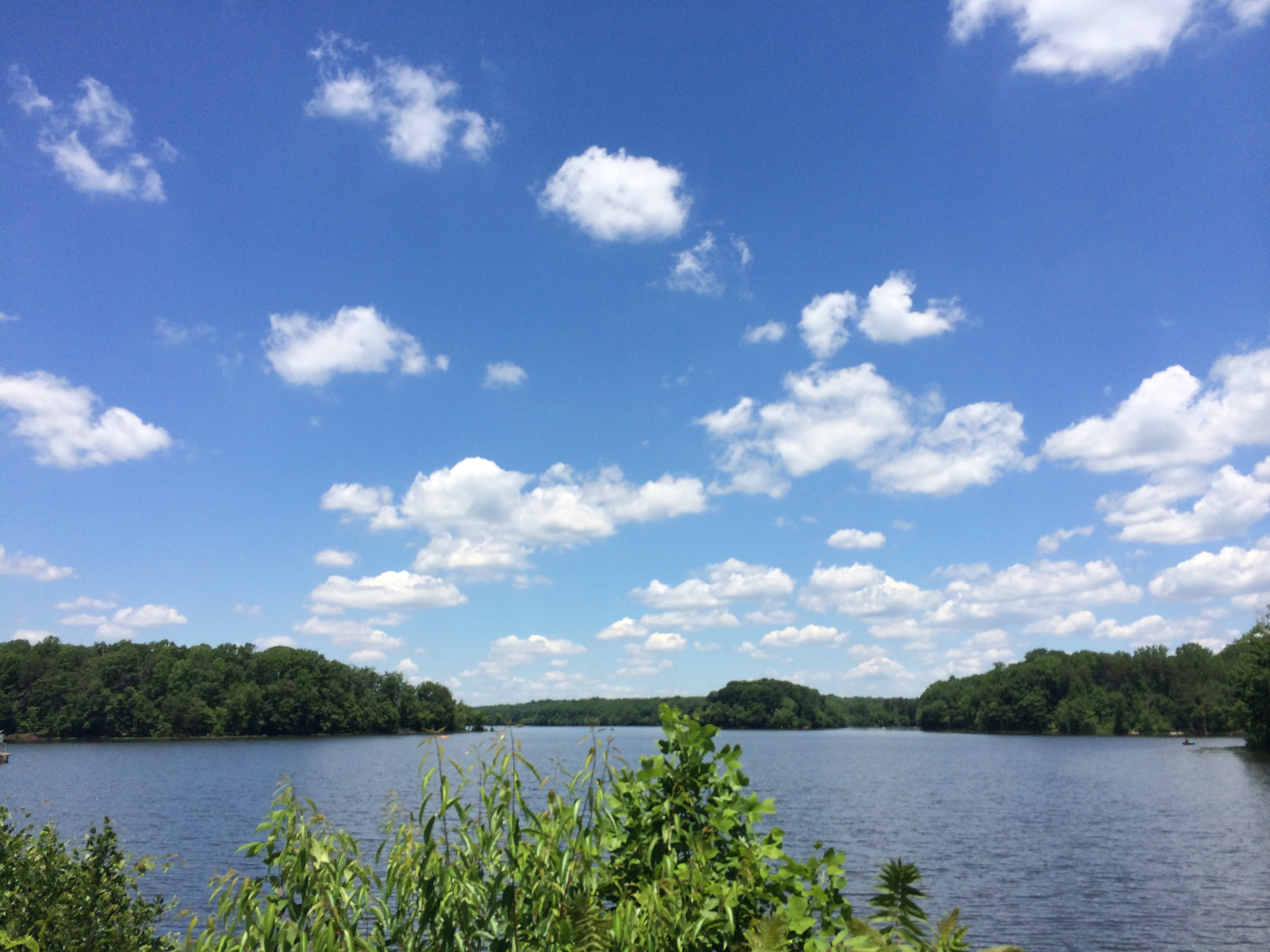 Burke Lake Park